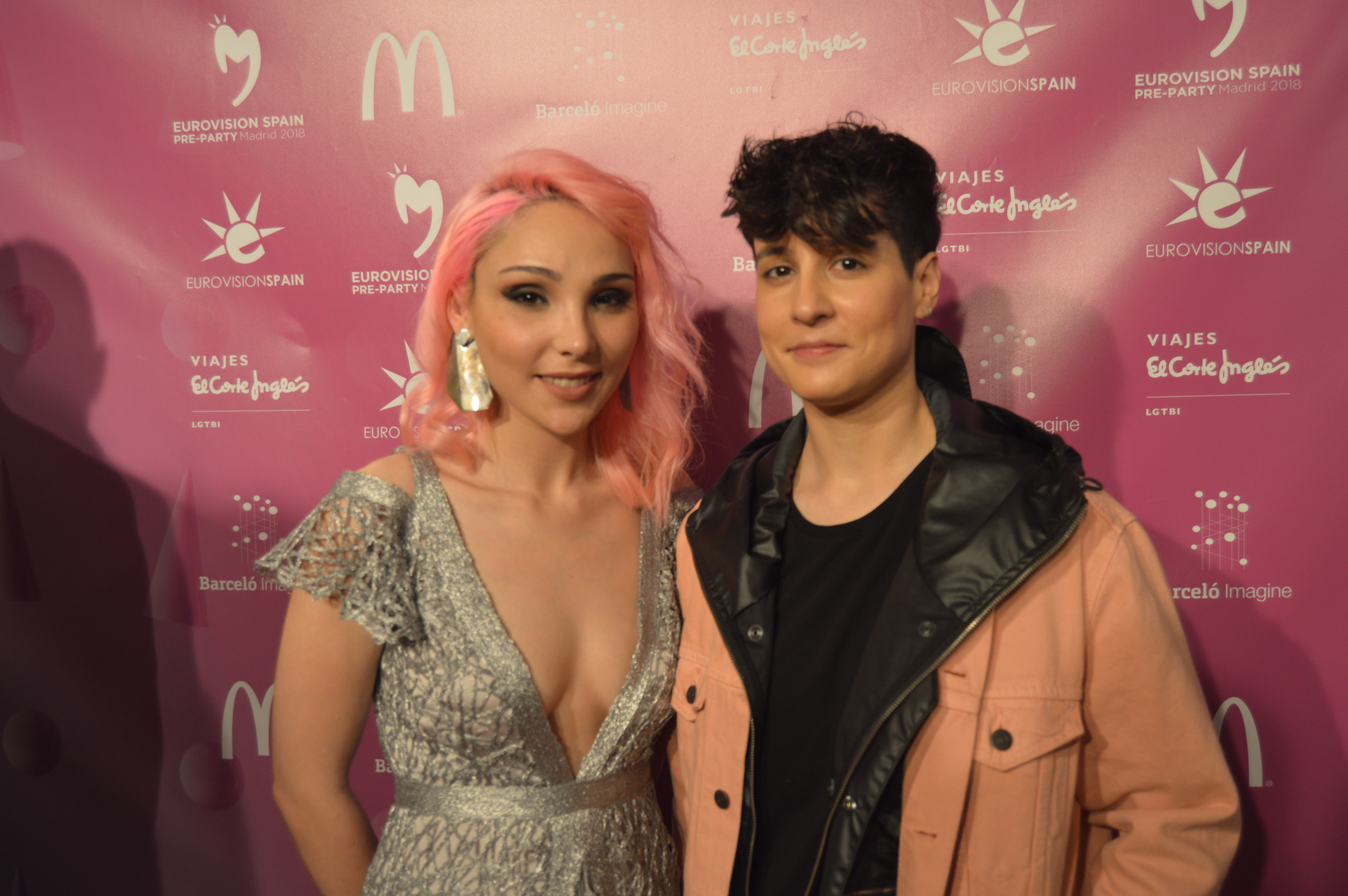 Las portuguesas Claudia Pascoal e Isaura en la Eurovision Spain PreParty en Madrid (Abril 2018)